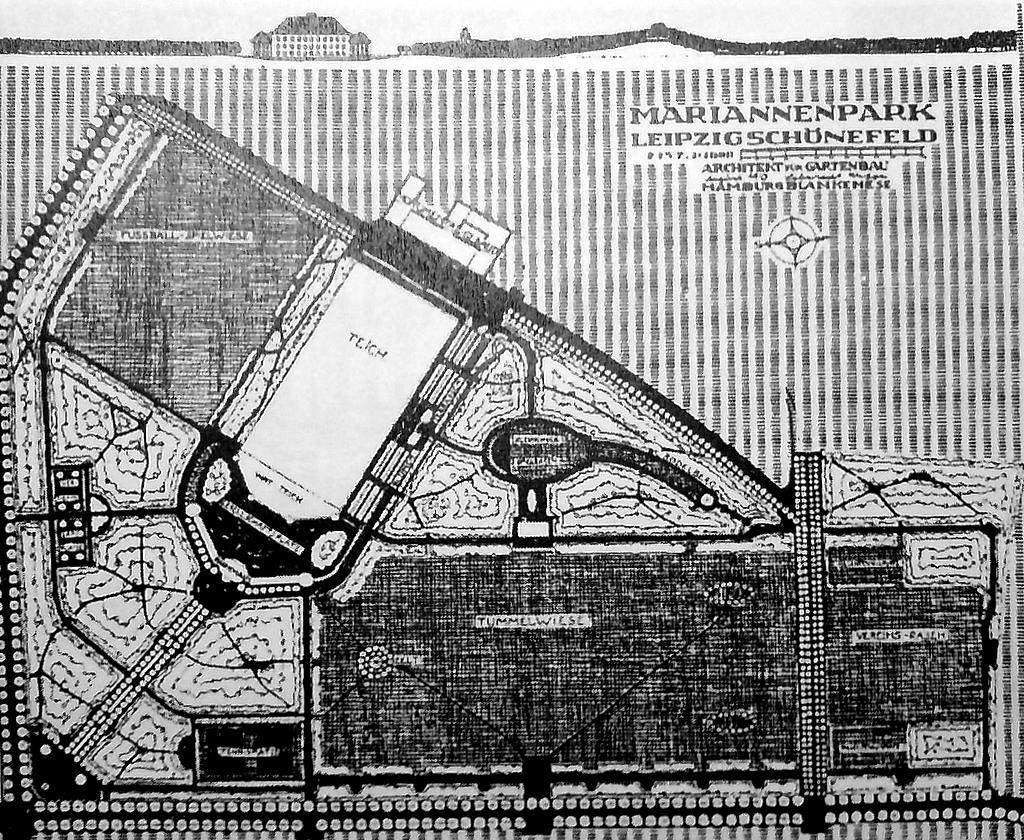 Gestaltungsentwurf des Mariannenparks in Leipzig-Schönefeld von Leberecht Migge